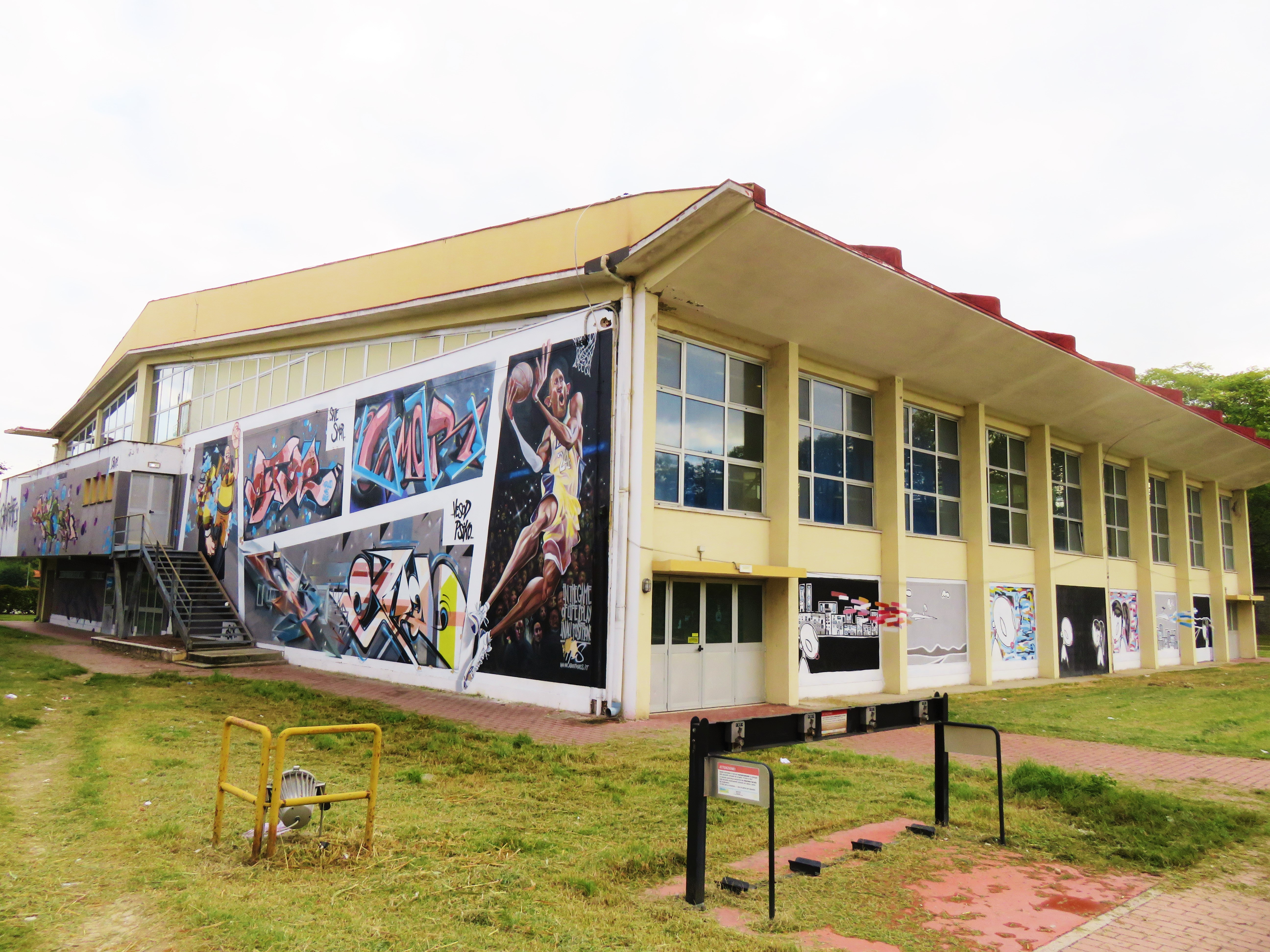 Esterno con graffiti